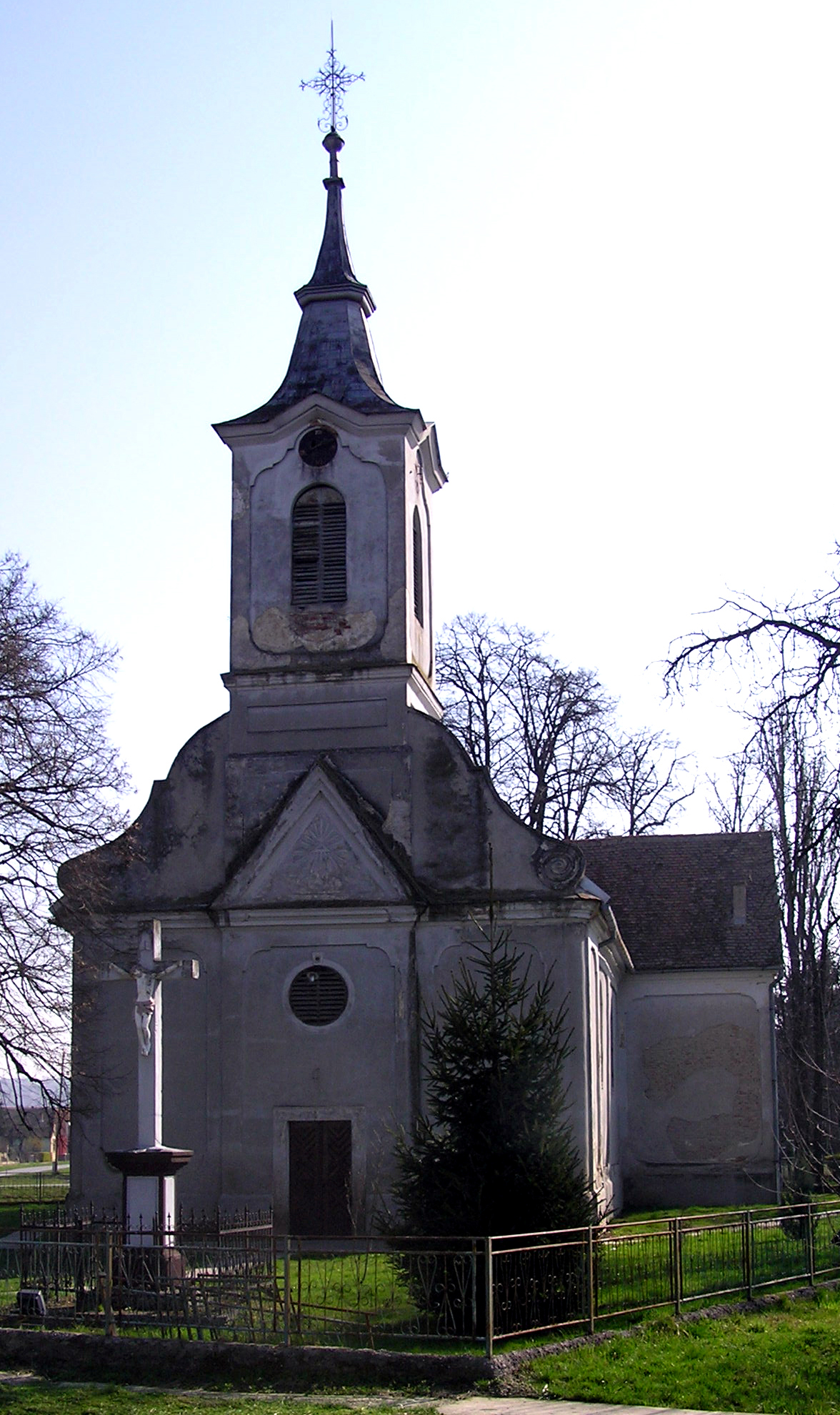 A kép a baranyabáni római katolikus templomot ábrázolja északról, a főbejárat felől.